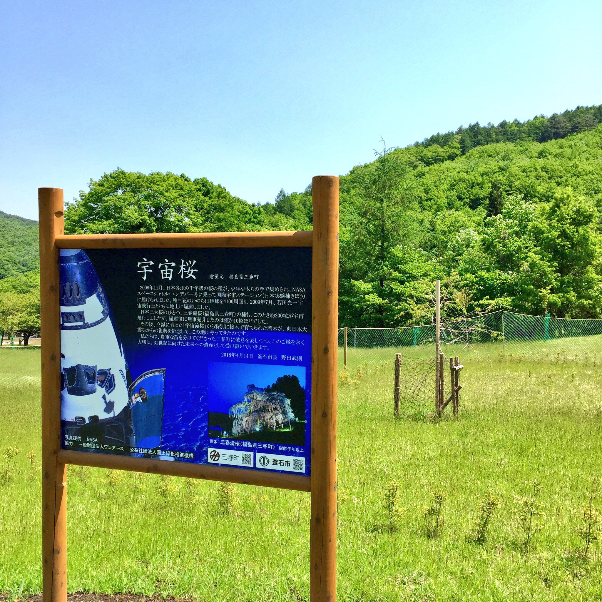 釜石市の世界遺産橋野鉄鉱山に贈られた宇宙滝桜